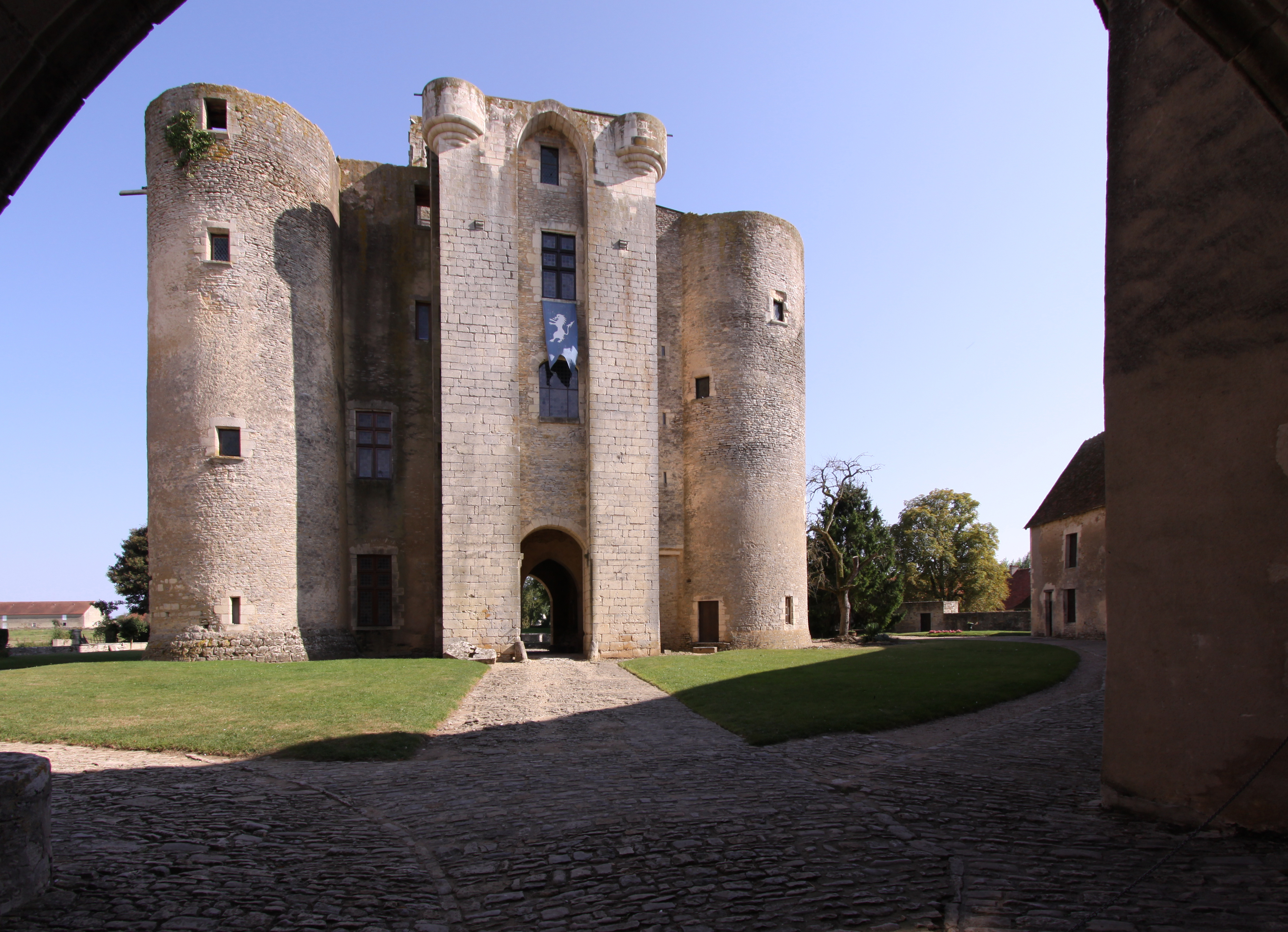 Burg Sagonne im französischen Département Cher - Donjon